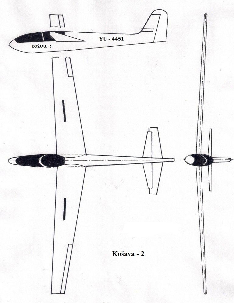 Crtež jugoslovenske jedrilice Košava-2